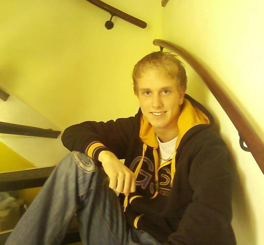 Nederlands entertainer